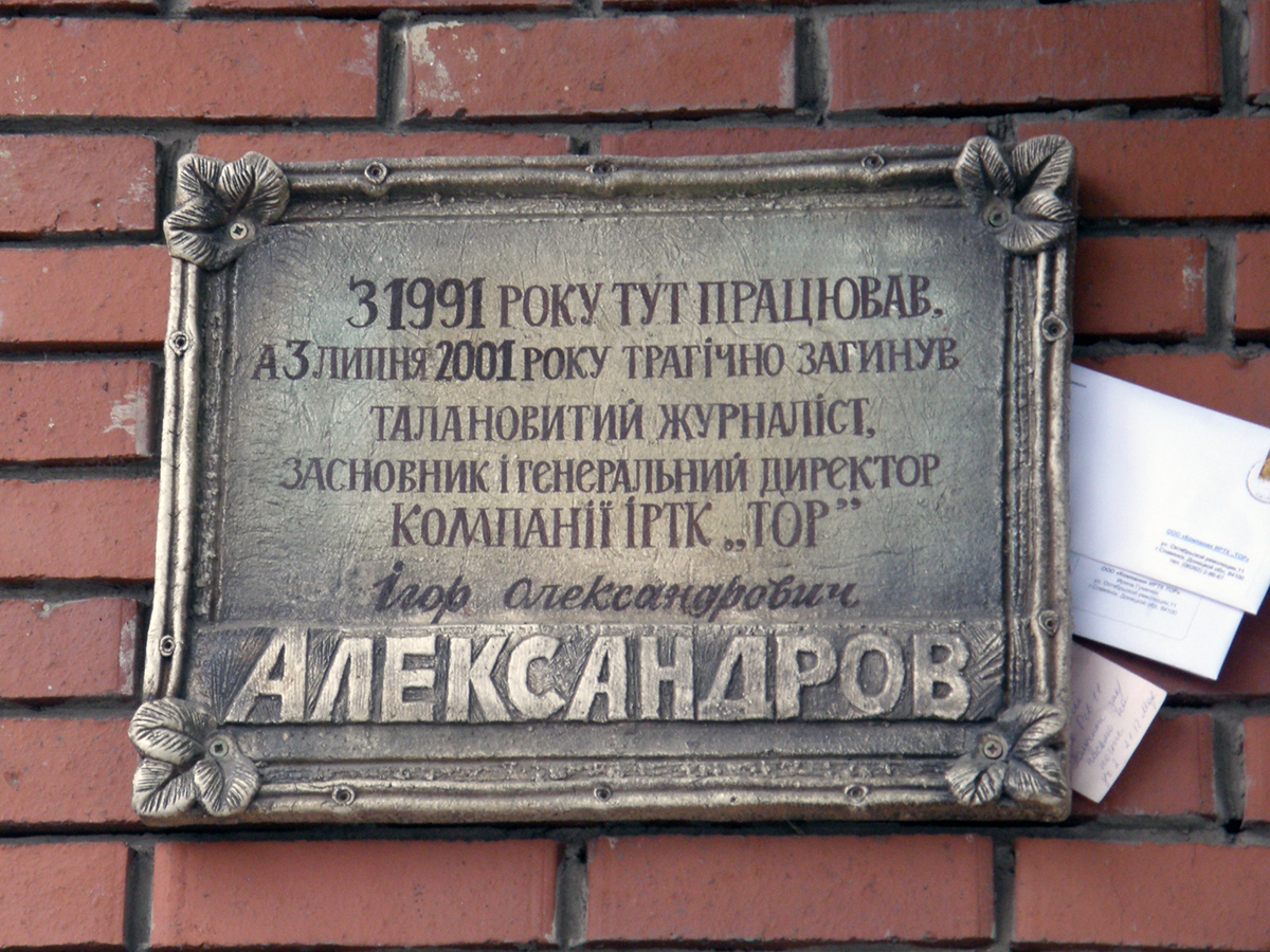 мемориальная доска Александрову на славянской телестудии